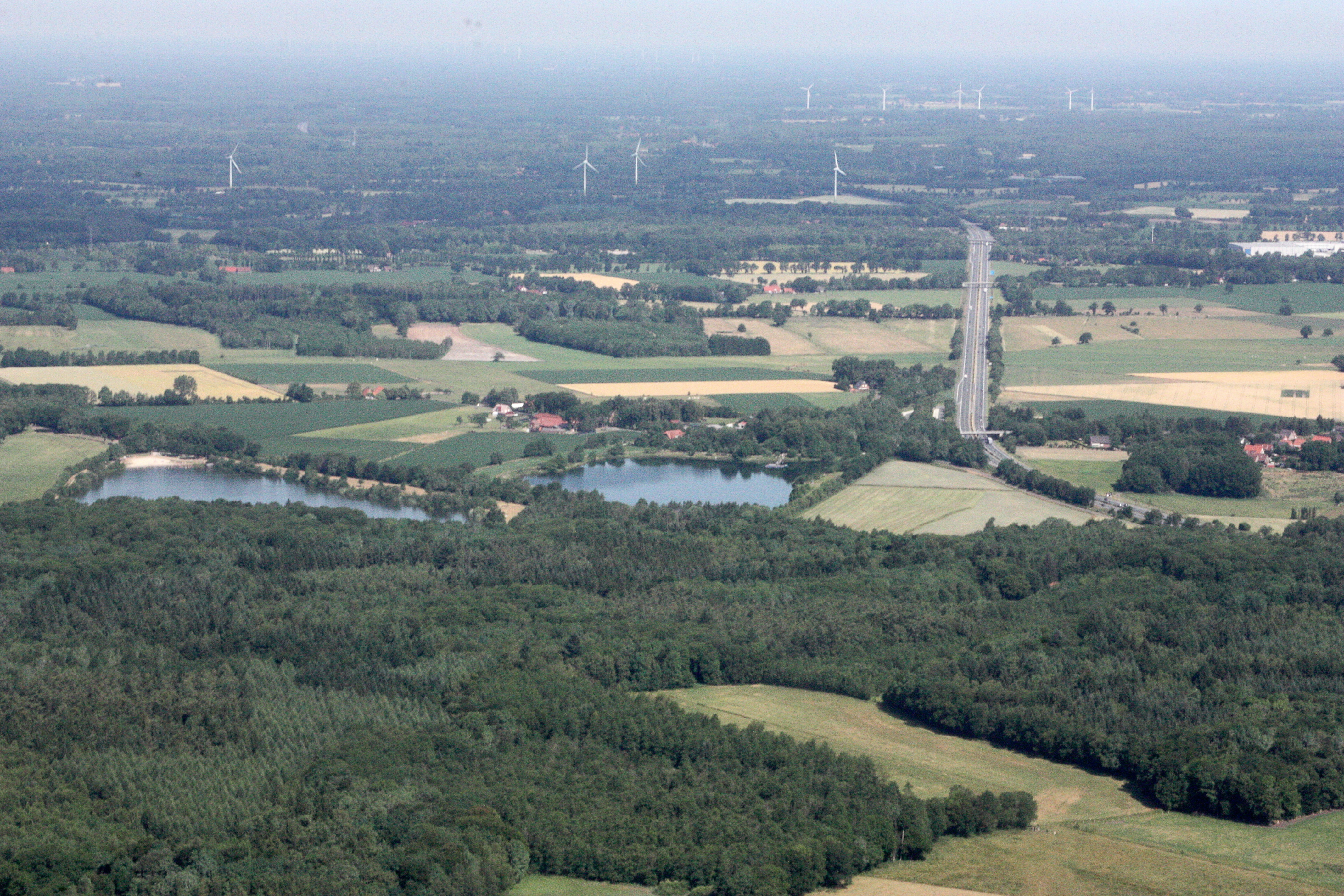 Luftaufnahmen Oldenburg (Oldenburg), mit Weiterflug nach Westen; 1500 Fuß Flughöhe; Juli 2010; Originalfoto bearbeitet: Tonwertkorrektur und Bild geschärft mit Hochpassfilter